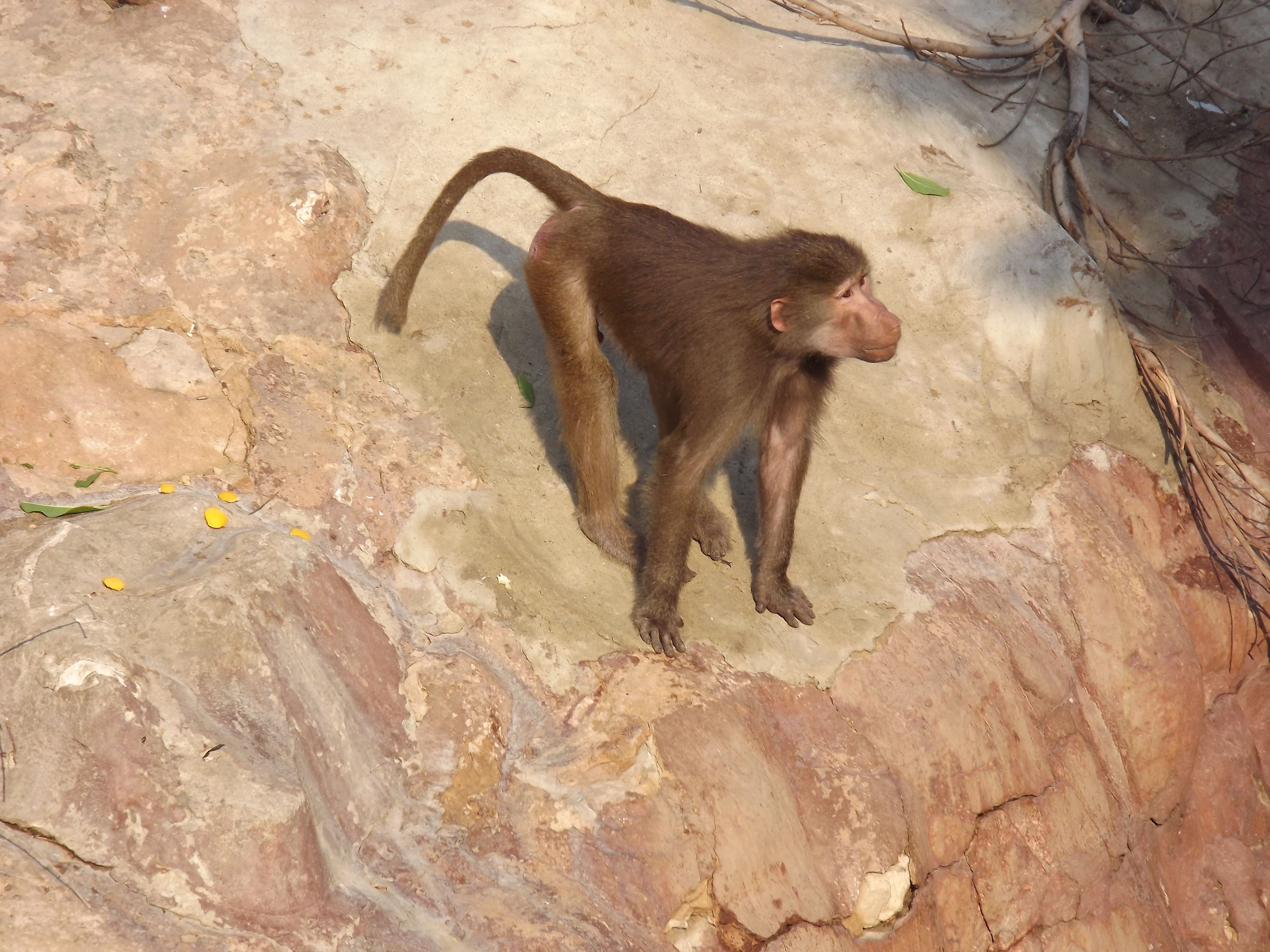 قرد حبشي في حديقة حيوان النزهة - الاسكندرية